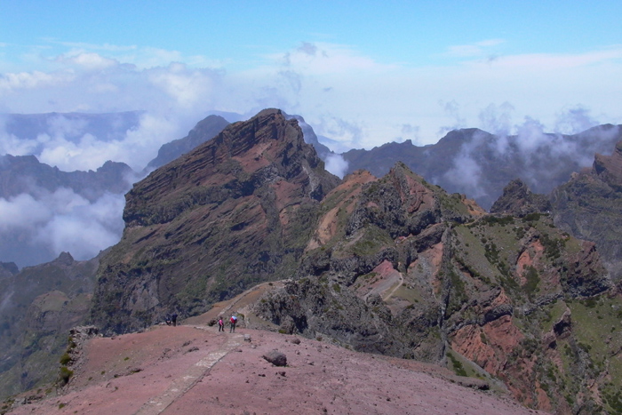 Picture taken by Daniel van der Ree, The Netherlands